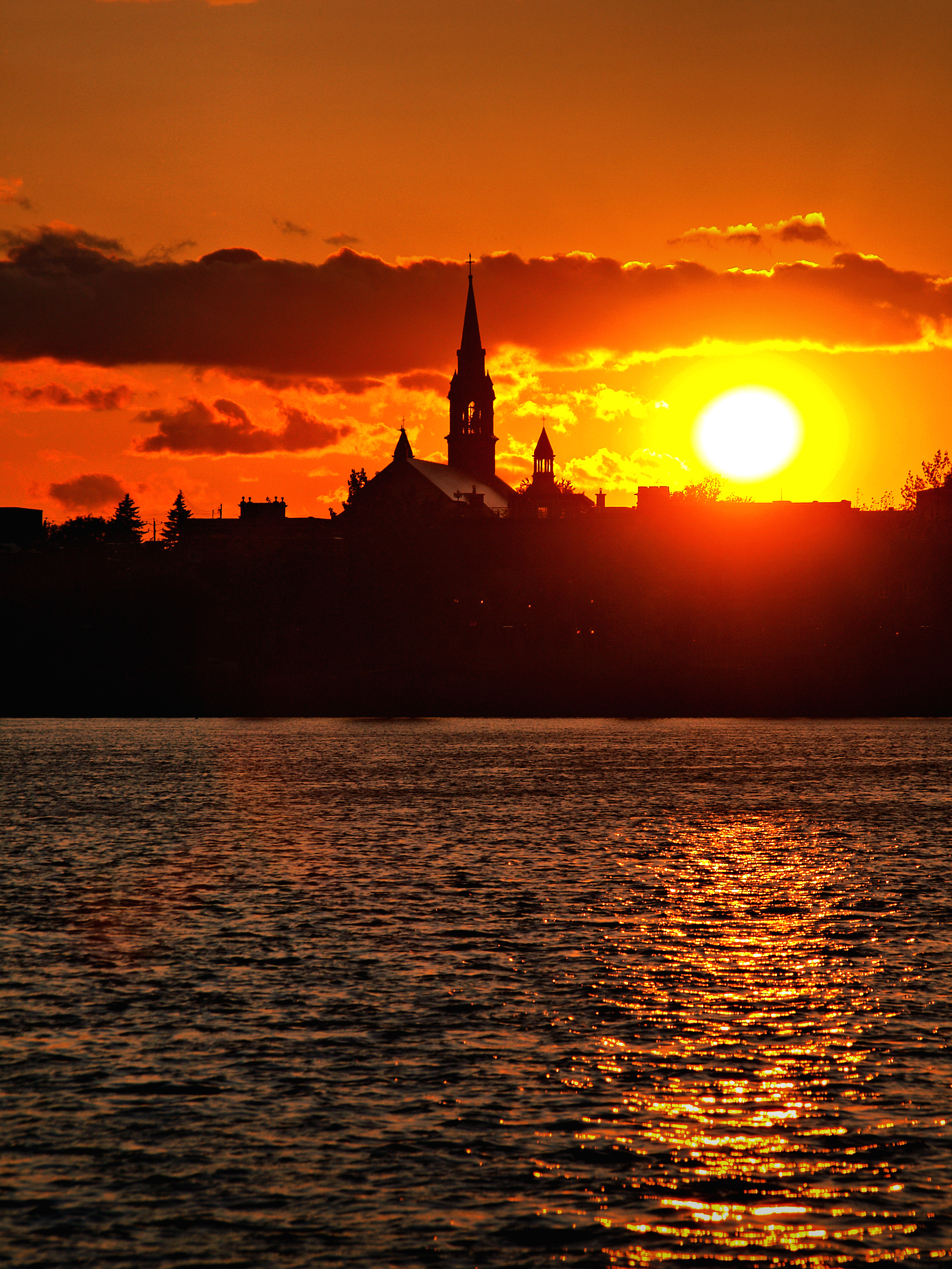 Saint-Jean-sur-Richelieu, Montérégie (Québec) - Coucher de soleil sur la cathédrale Saint-Jean-l'Évangéliste